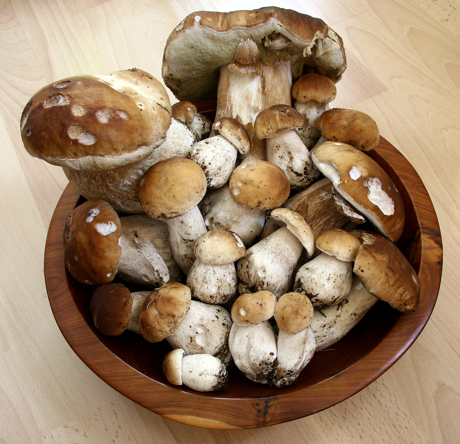 Beschreibung: Schale mit Steinpilzen Quelle: selbst fotografiert Datum: August 2006 Fotograf: Karsten Dörre (grizurgbg)